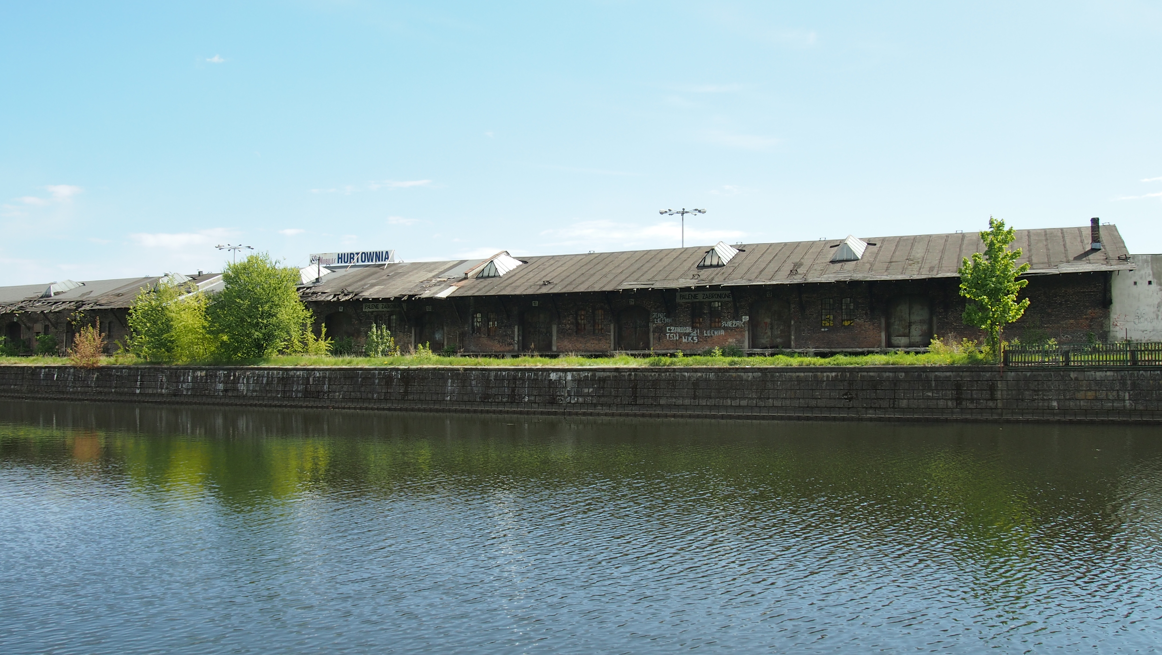 Dawny dworzec kolejowy Gdańsk Brama Nizinna, magazyny. Na pierwszyn planie odnoga Motławy.